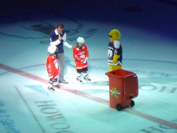 Das Maskottchen der Eisbären Berlin, Bully, während der Pausenunterhaltung.